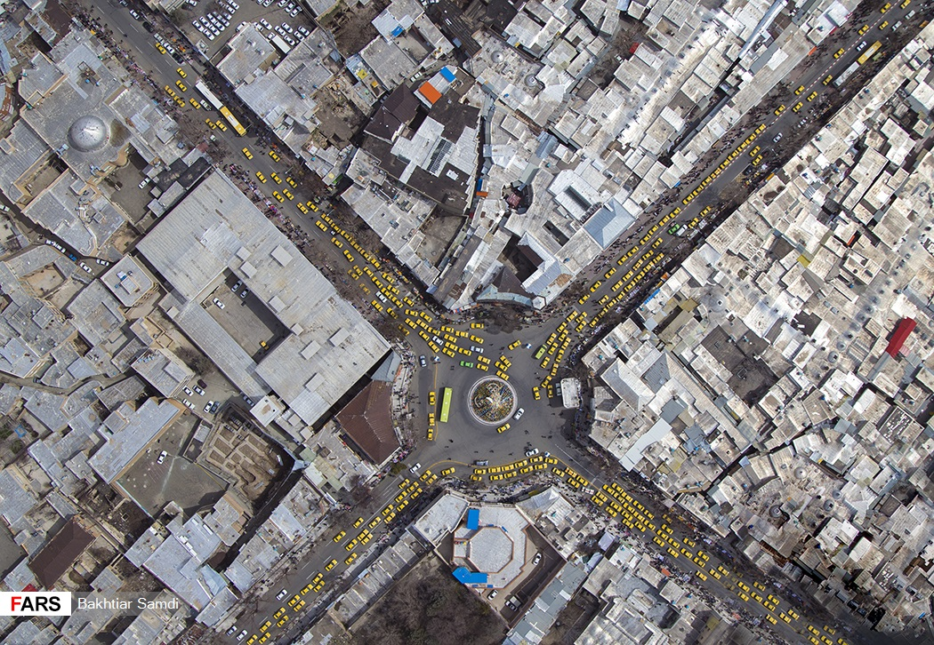 تصویرهوایی از شهر سنندج